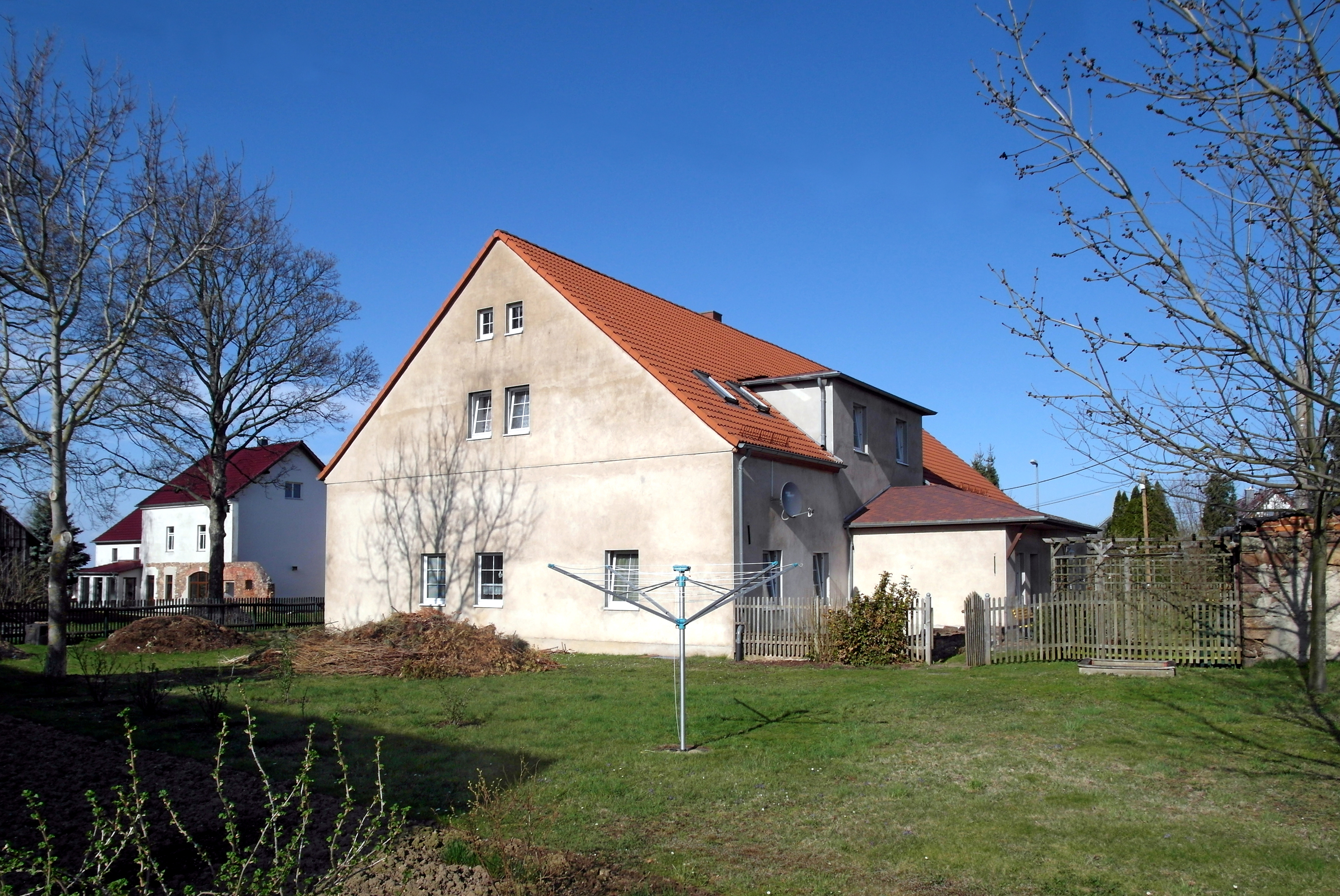 10.04.2018 04703 Gorschmitz (Leisnig): Rittergut Gorschmitz. Sicht von Südwesten zum einstigen Herrenhaus Gorschmitz 1 (GMP: 51.159037,12.894472). Gebaut hatte es Georg Hofmann von 1687 bis 1689. Im Gefolge der Bodenreform von 1945/46 wurde das Herrenhaus bis auf den Erdgeschoßbereich abgebrochen und zu einem Neubauernhaus umgebaut. Einzig der unverputzt gebliebene Nord-Ost-Giebel verrät noch, daß das einstige Herrenhaus mindestens ein weiteres Geschoß gehabt haben muß. [SAM5303.JPG]20180410715DR.JPG(c)Blobelt